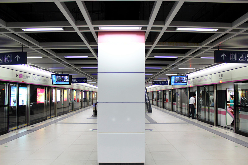 武汉地铁2号线